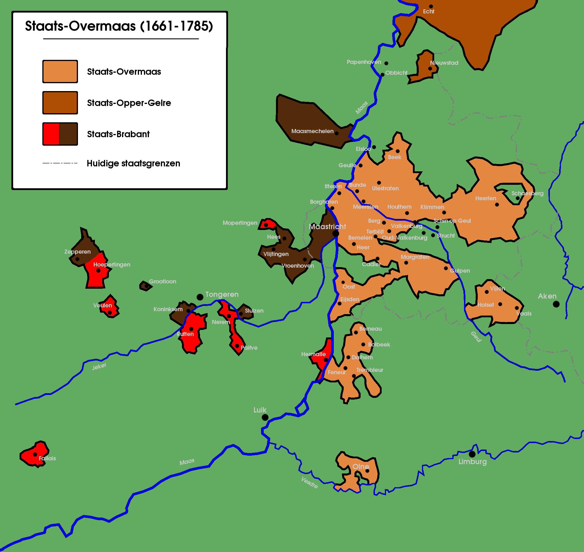 Landen van Overmaas en de Redemptiedorpen (in rood) voor 1785